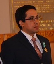 Первым гражданином Венесуэлы, награжденным Орденом Дружбы